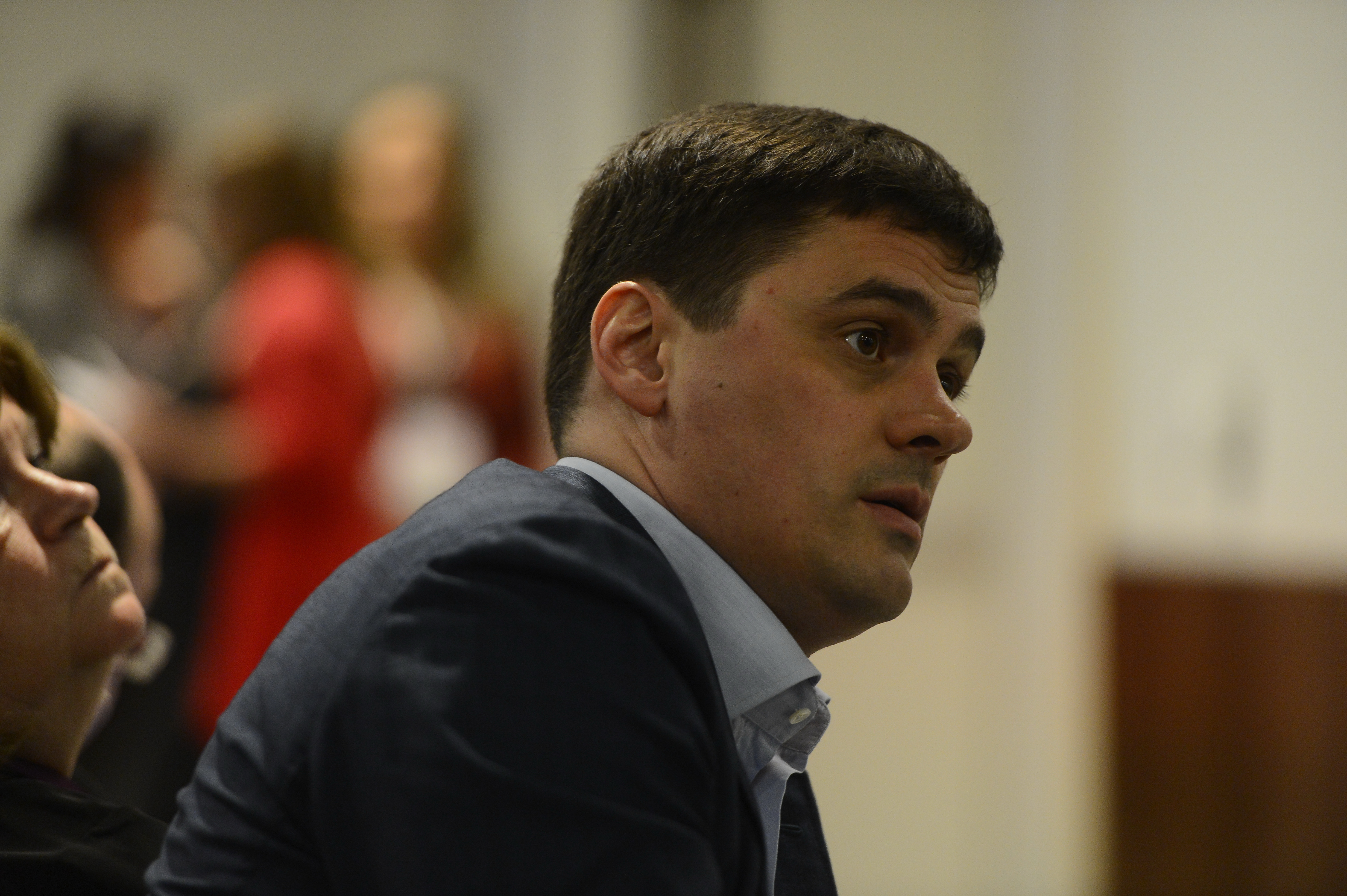 Rio de Janeiro - O ex-nadador e medalhista russo Alexander Popov durante balanço da 10ª reunião da Comissão de Coordenaçãodo Comitê Olímpico Internacional para os Jogos Olímpicos Rio2016 (Fernando Frazão/Agência Brasil)